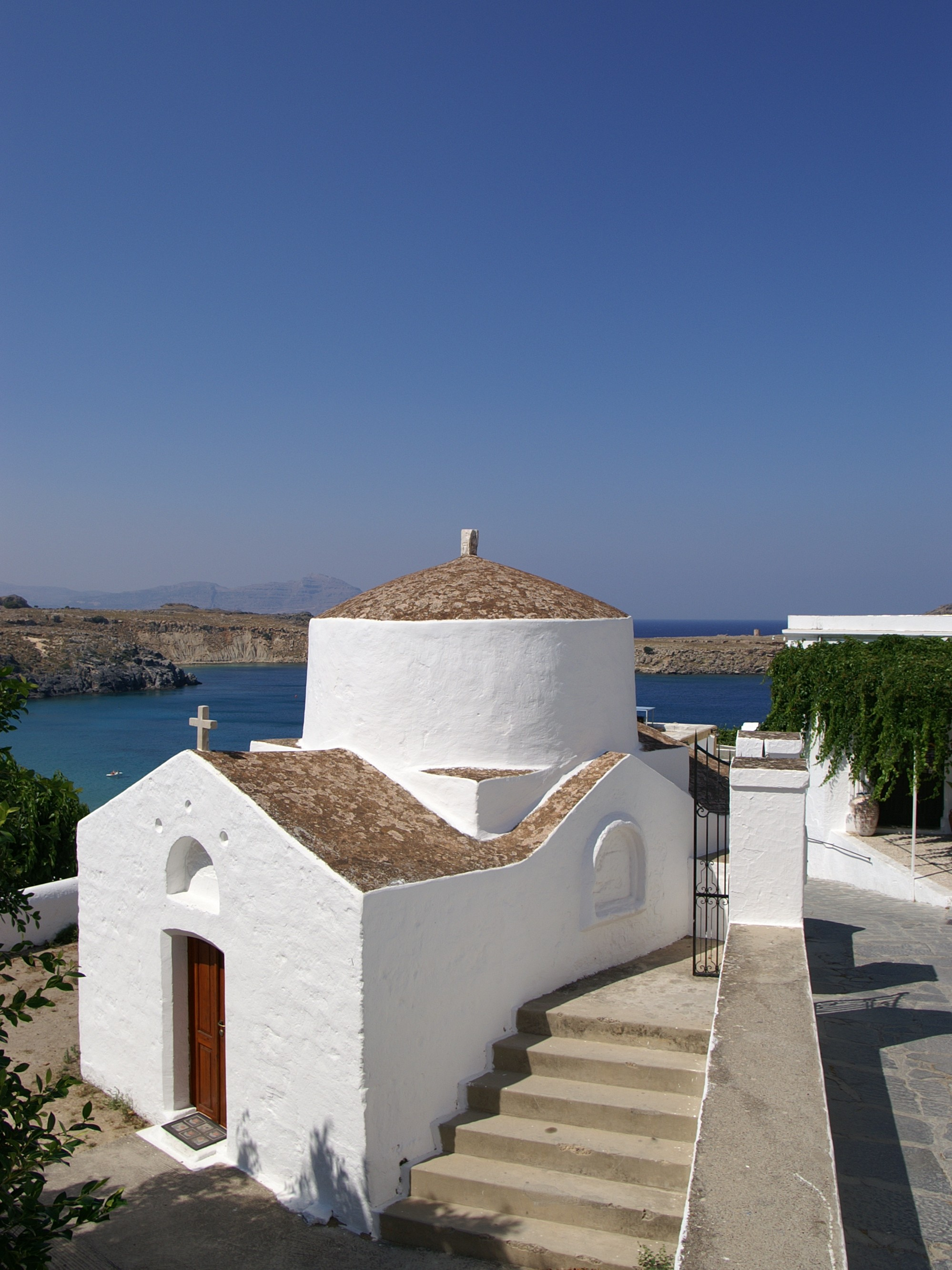 griechisch orthodoxe Kapelle Agios Georgios Pahimahiotis mit Blick auf das Meer, gelegen an einer Gasse in Lindos am Nordost-Hang unter der Acropolis of Lindos . Rhodos.